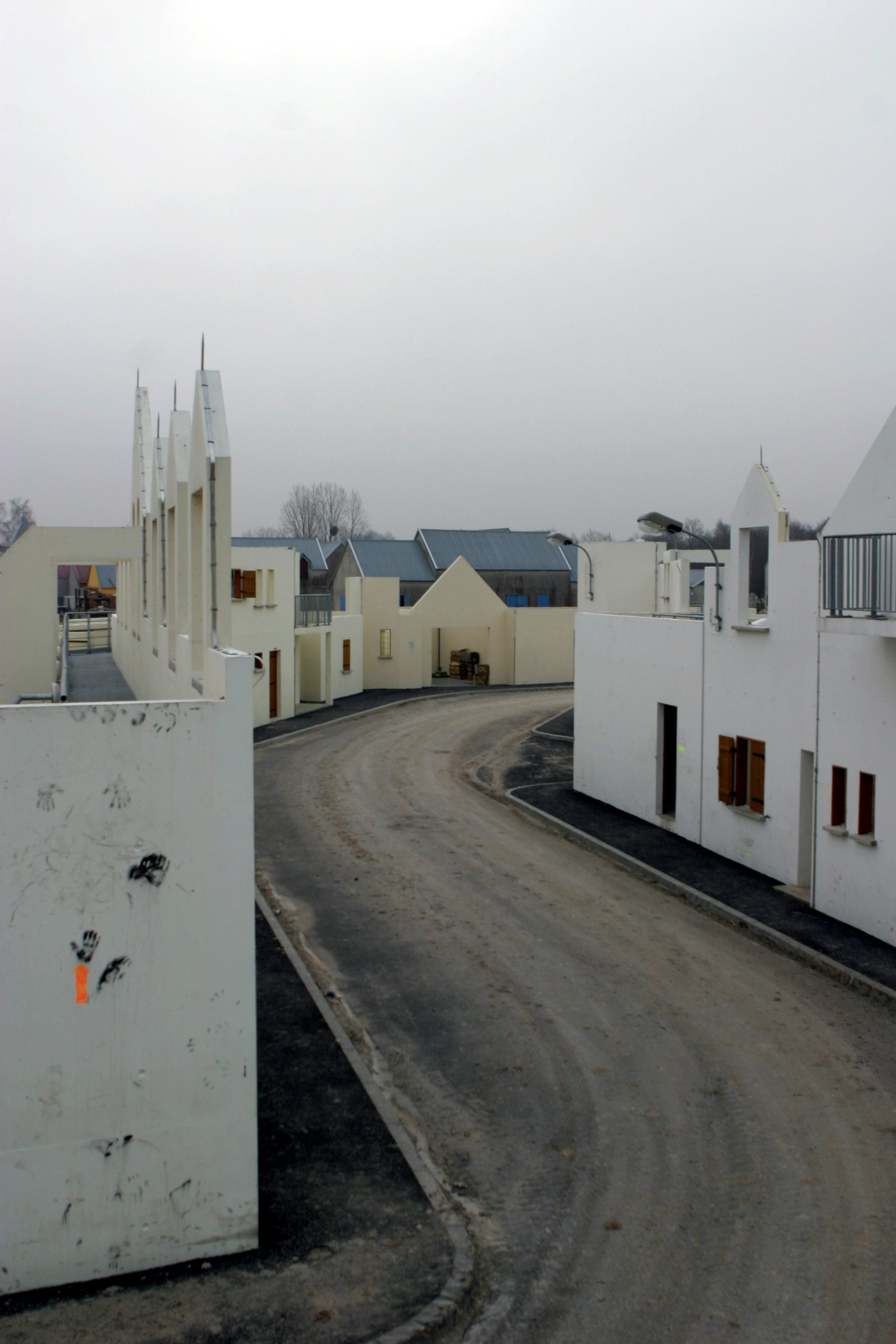 Photo de la rue du MASTAC (module d'acquisition des savoir-faire techniques et tactiques) du Centre d'entraînement au combat en zone urbaine de Sissonne en France